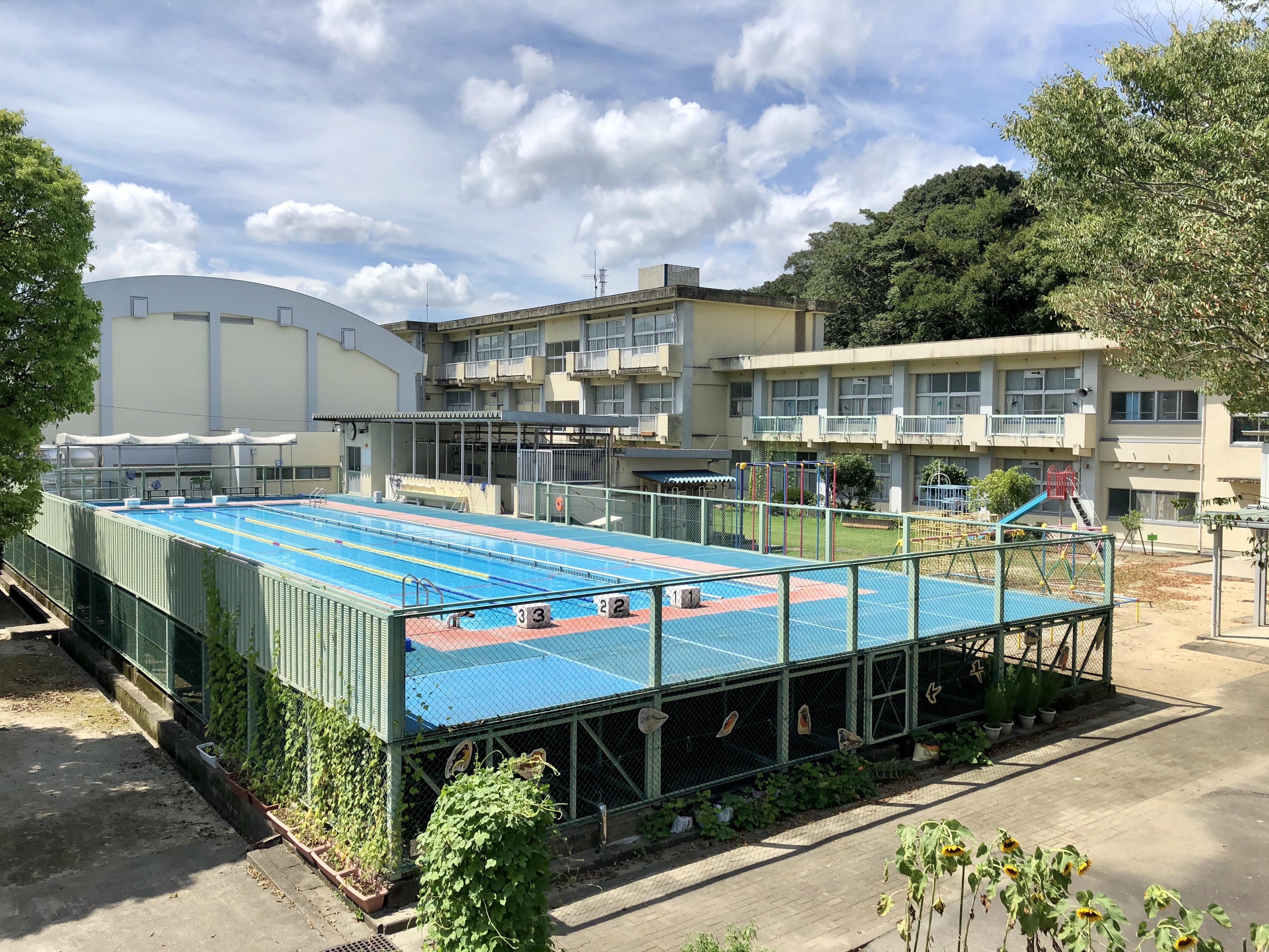 岡崎市立生平小学校（岡崎市生平町）